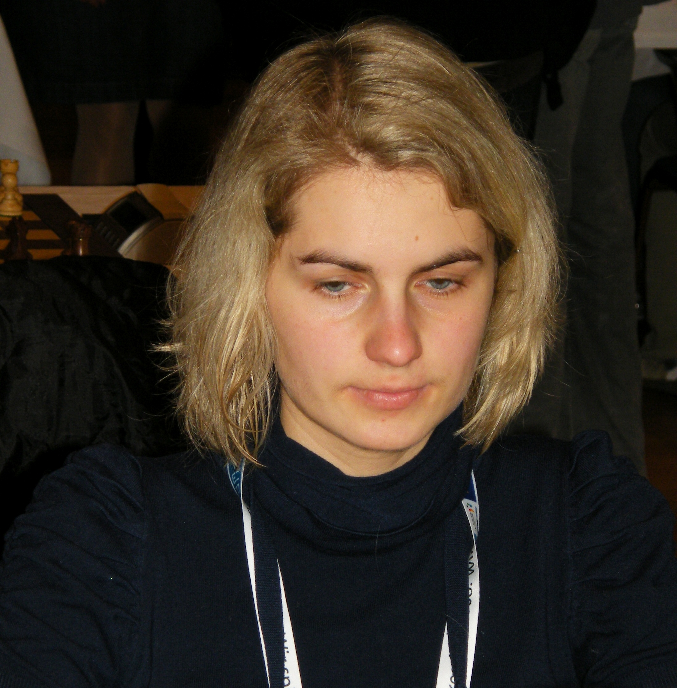 Jelena Maksimova (geb. Klimets) bei der 38. Schacholympiade in Dresden 2008